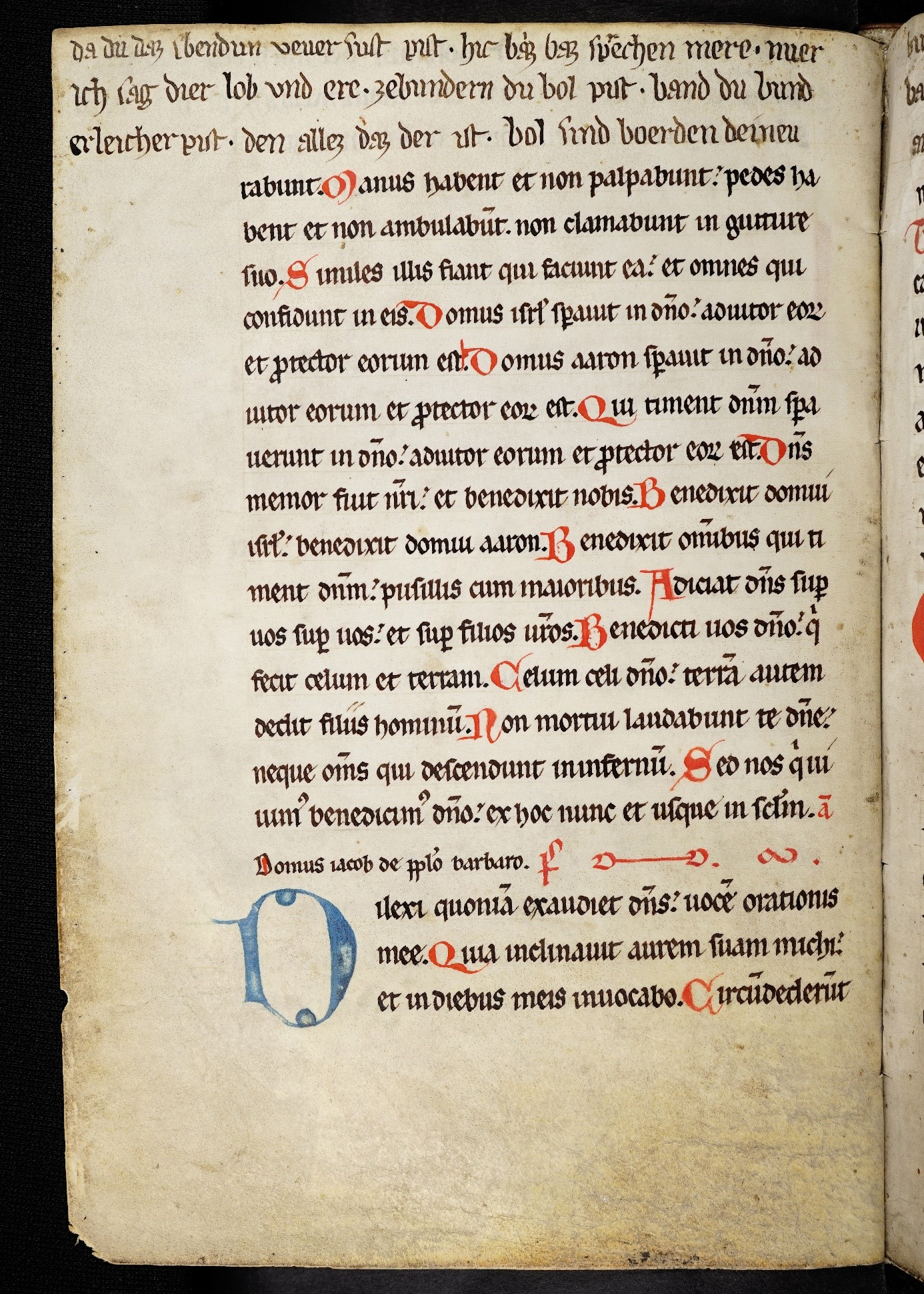 UBG Ms 781 Psalterium; fol. 72v, Eintragungen auf den oberen Blatträndern („Legende von der heiligen Margarete“)